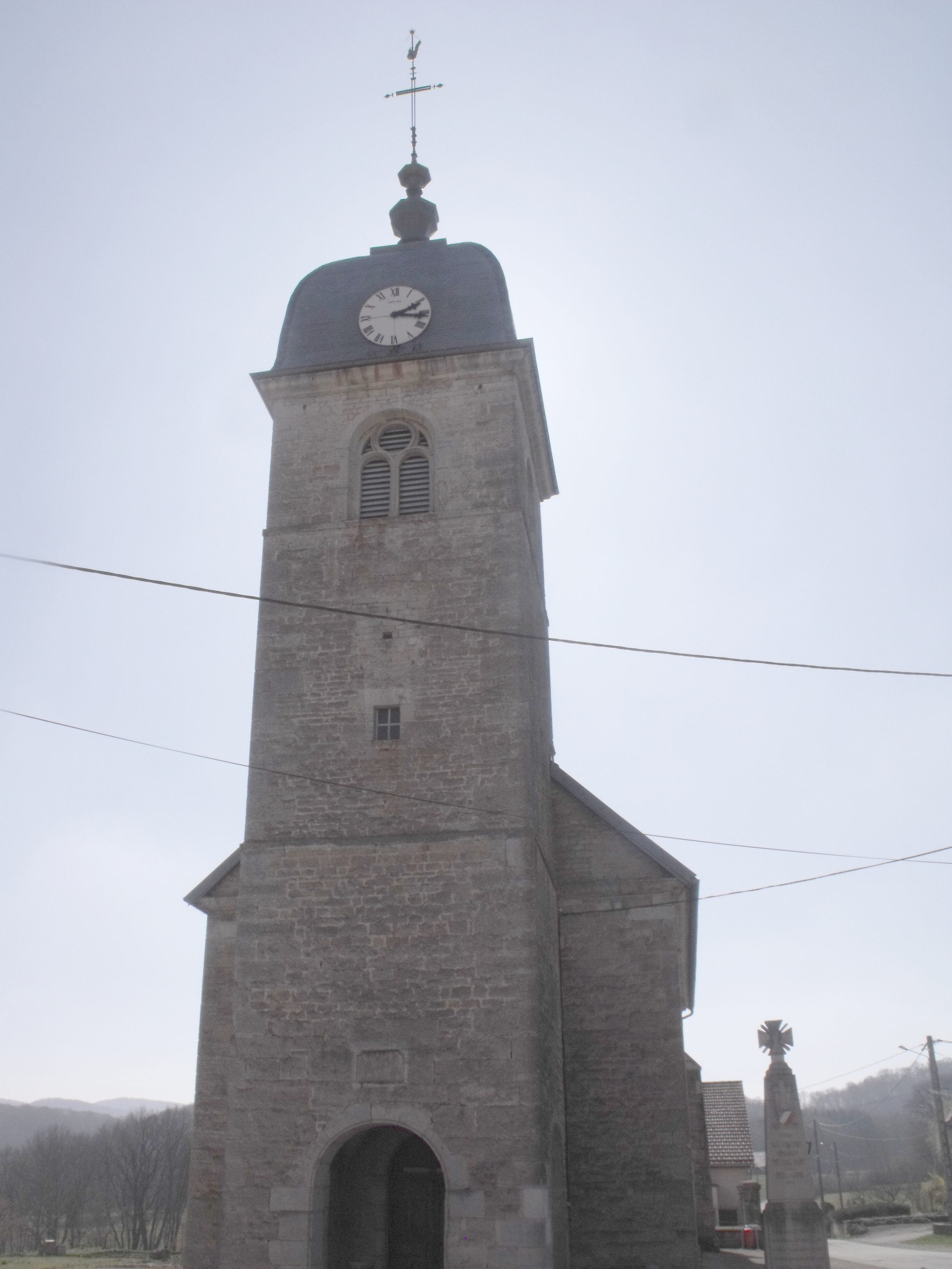 église de Chazot, Doubs, France